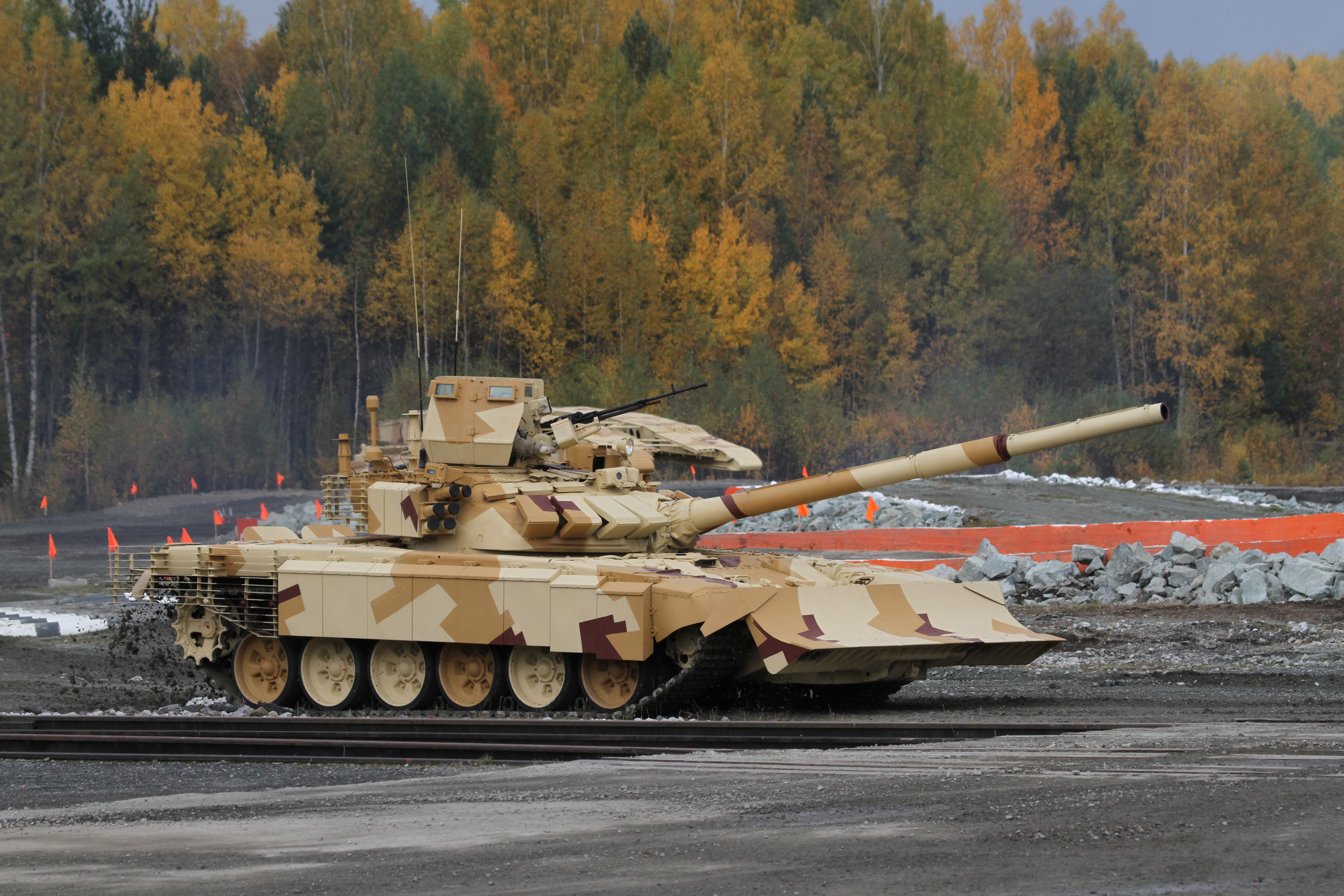 Модернизированный Т-72 с комплектом средств защиты для ведения боевых действий в городских условиях (Modified T-72 with additional protection kit for urban survival)